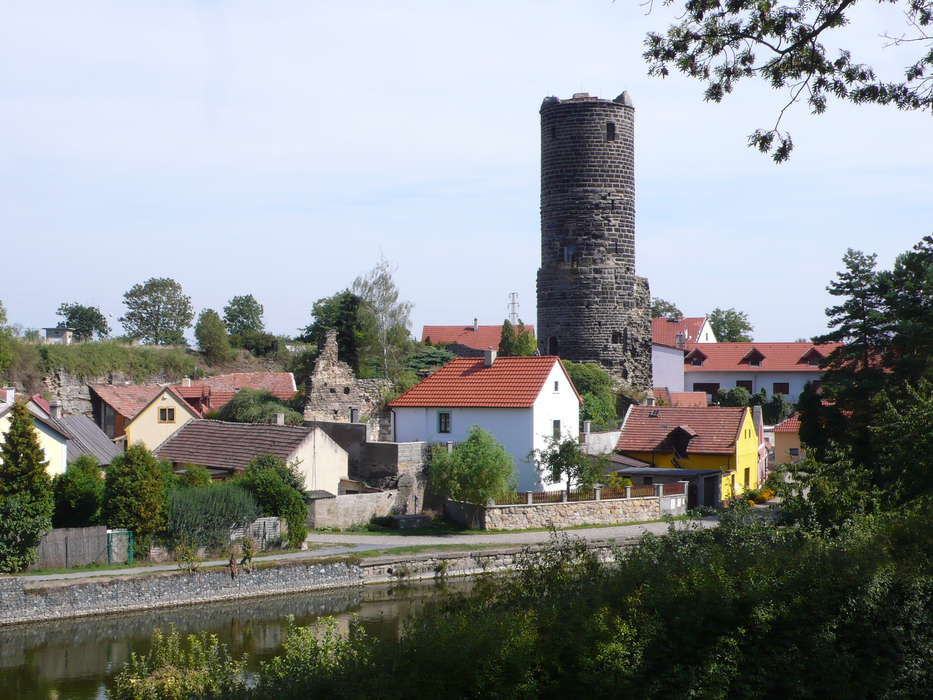 Zřícenina Jenštejn (2015)